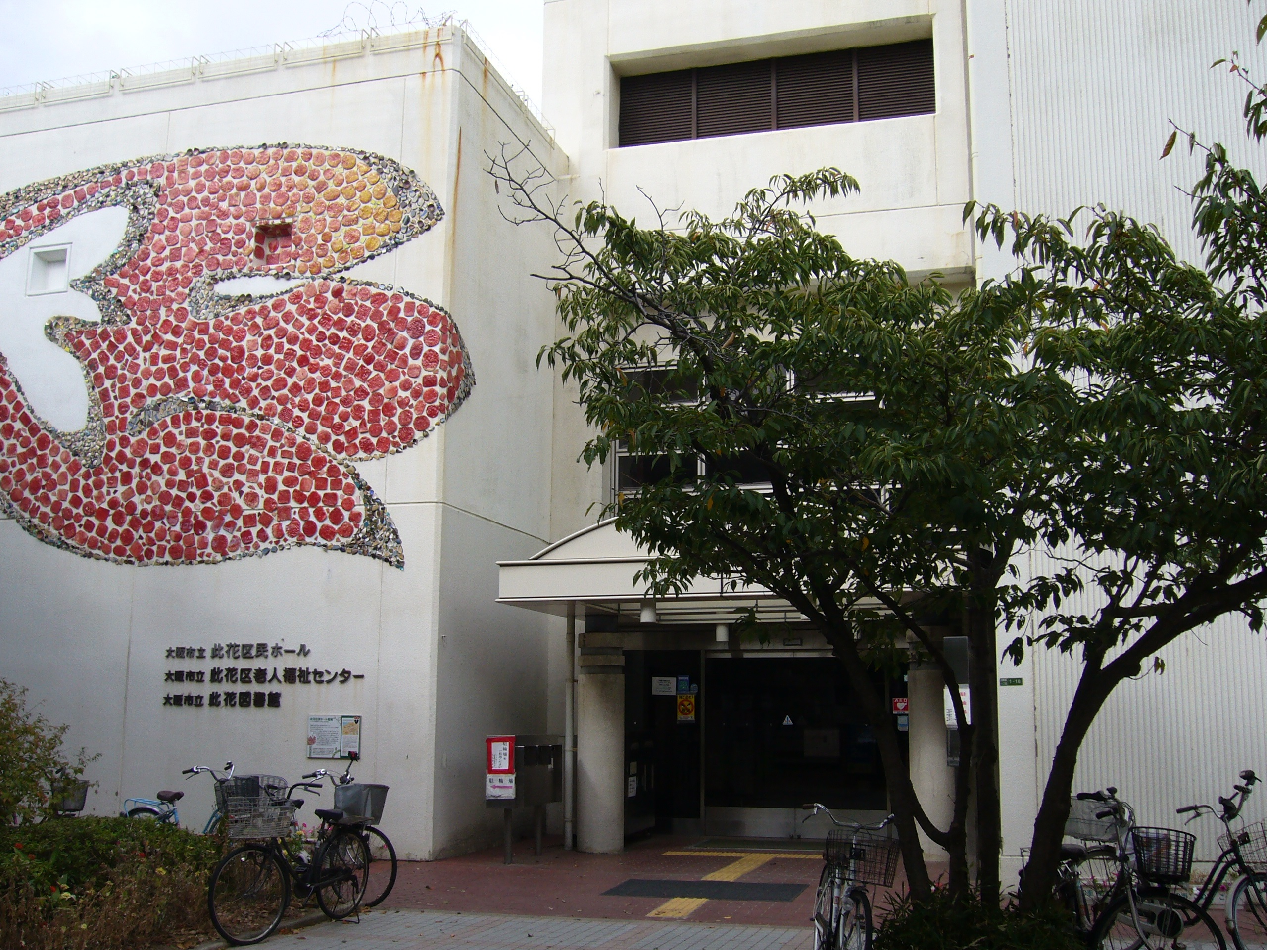 大阪市立此花図書館